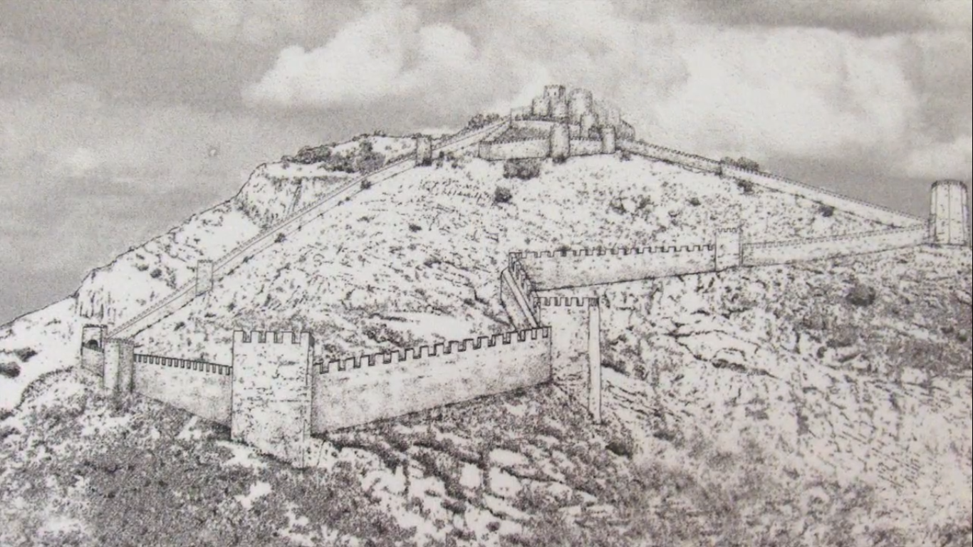 El castillo de Cullera con un primer recinto amurallado, el albacar viejo, dentro del cual se encontraba el castillo, dotado de torreones de flanqueo y una torre principal de 10 metros de altura.1 El albacar nuevo, rodeado con una muralla y cinco torres, se encuentraba a un nivel algo inferior.